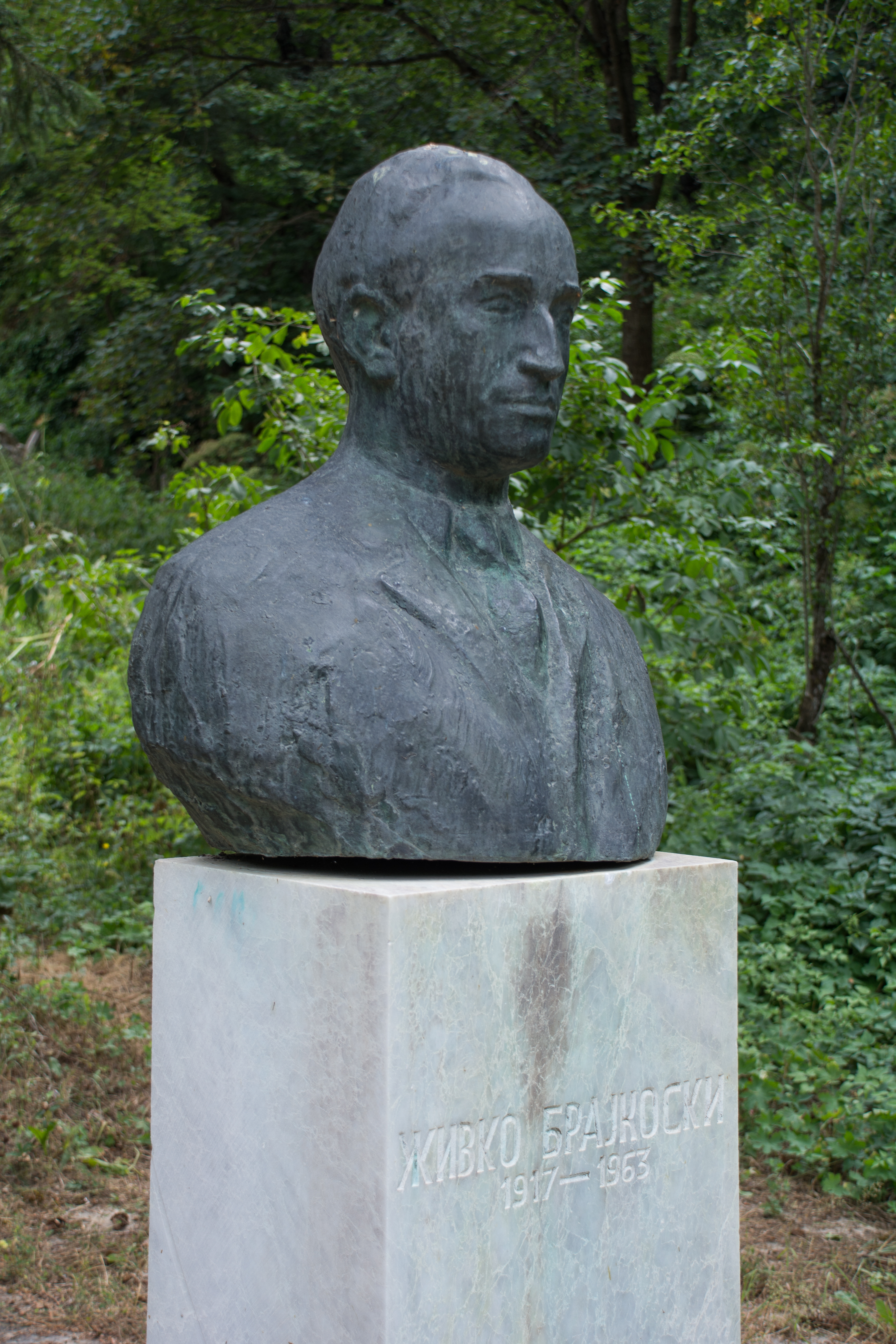 Споменик на македонски партизан Живко Брајкоски во Трница